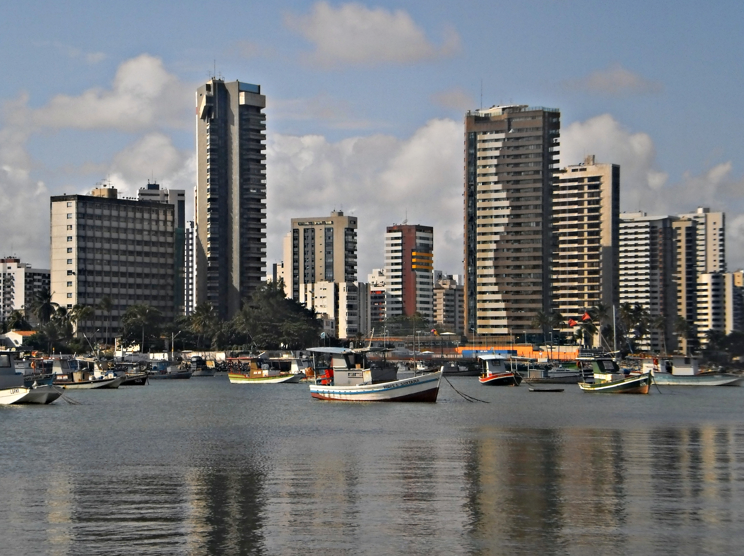 prédios e barcos vistos do dique e Candeias